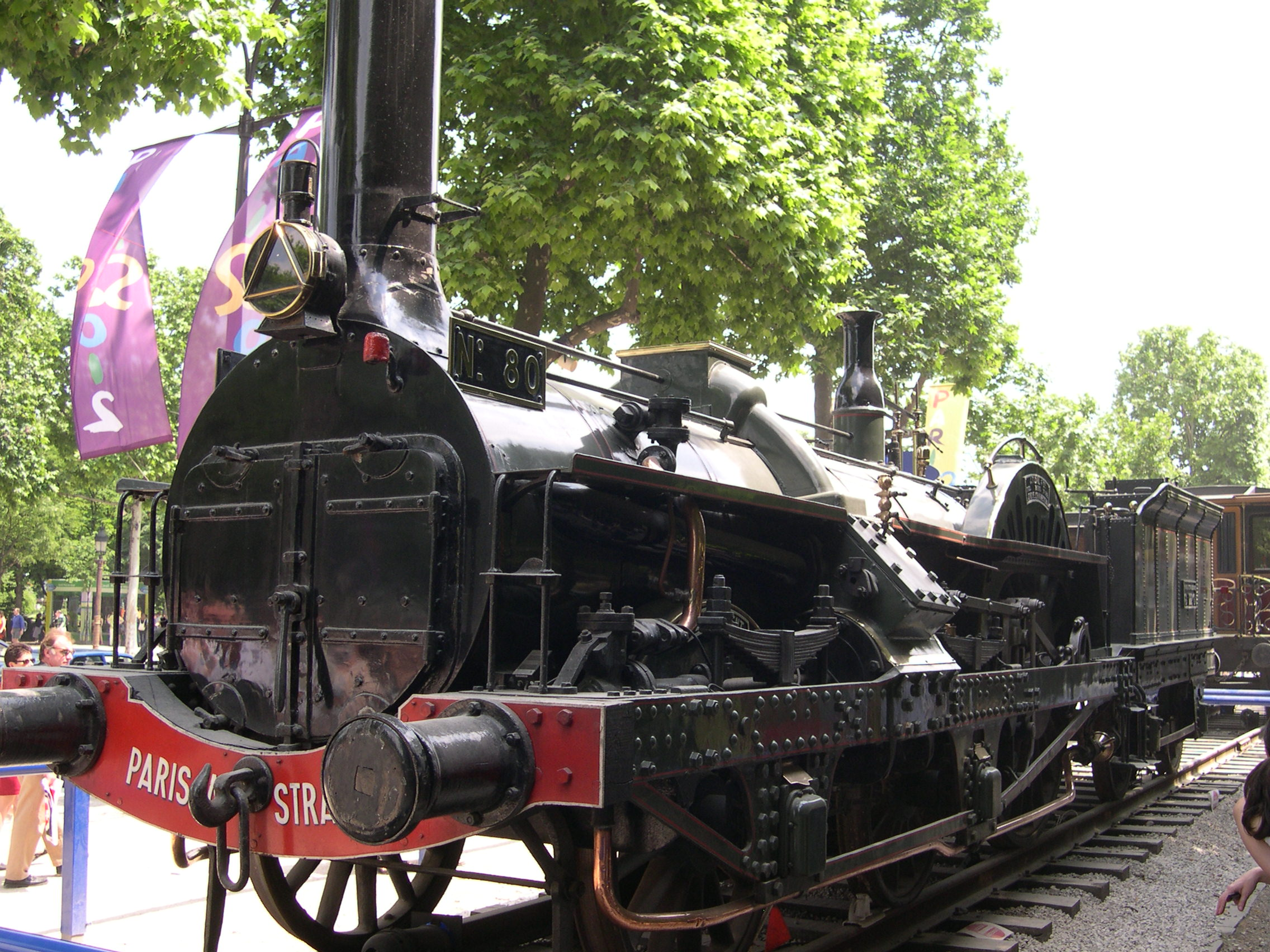 France Paris Champs Elysées Expo Train capitale 2003 Locomotive Crampton 80 Auteur : GIRAUD Patrick